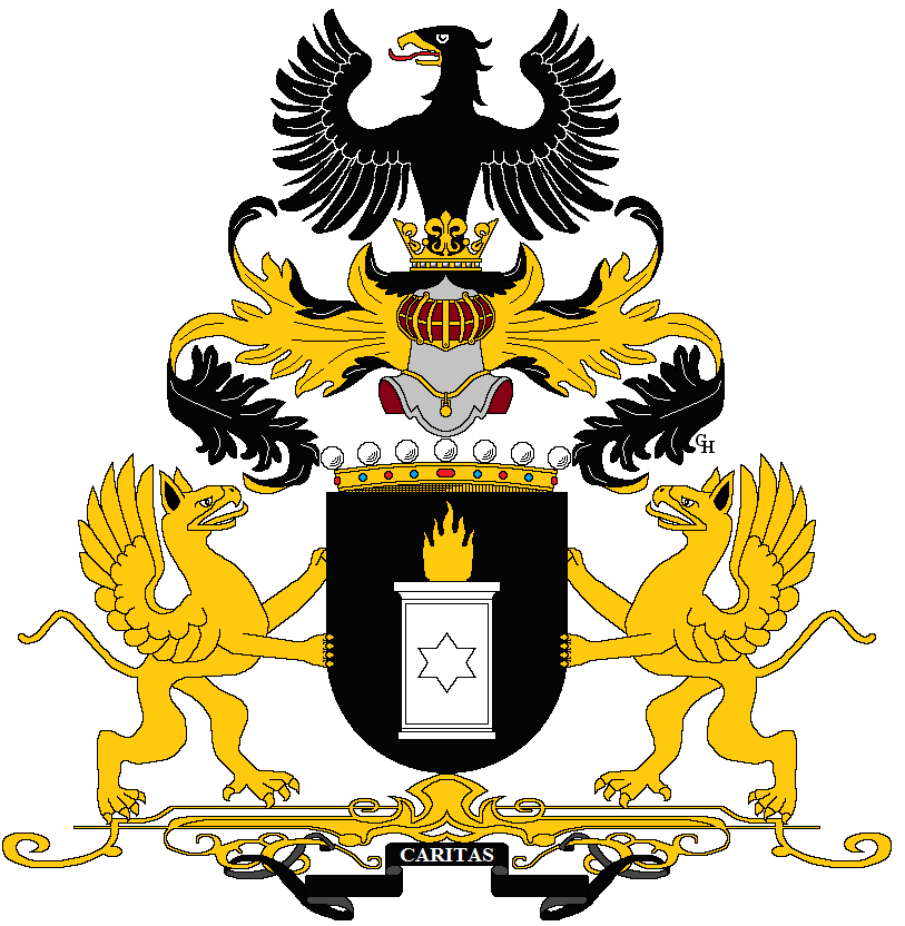 Wappen des österreichischen Philanthropen und Versicherungsagenten Johann Sieberer (1830–1914), verliehen anlässlich seiner Erhebung in den österreichischen Freiherrenstand 1910. Zeichnung von Gerd Hruška ( Für weitere Informationen zu dieser Standeserhebung siehe (